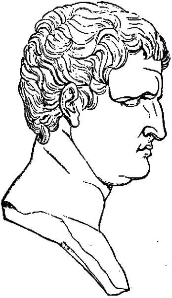 Marcus Vipsanius Agrippa